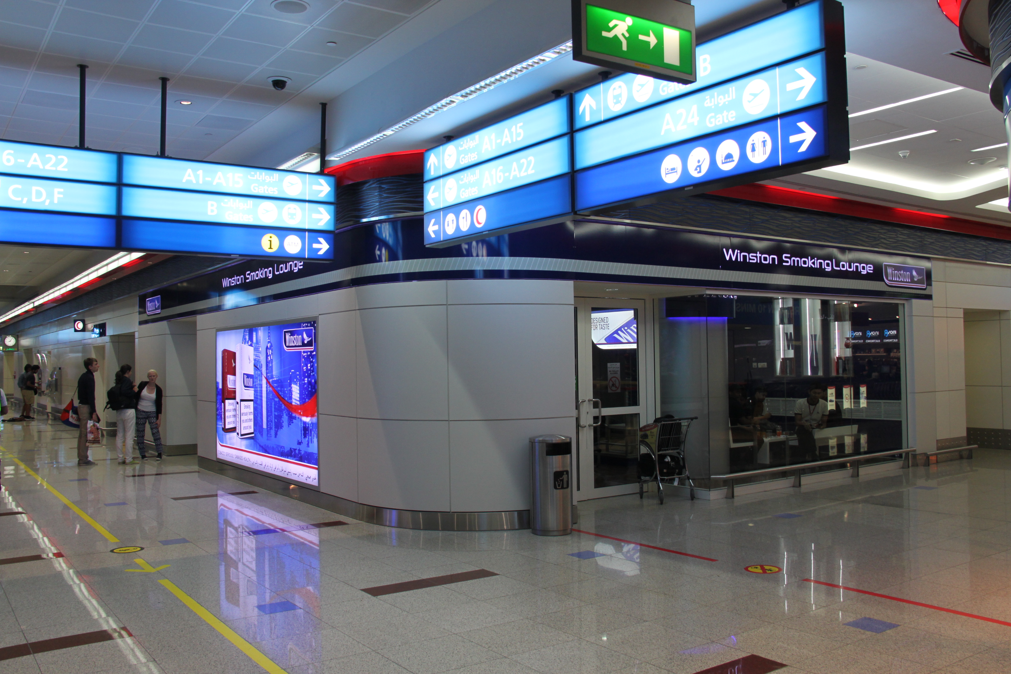 A smoking room sponsered by Winston at Dubai International Airport.